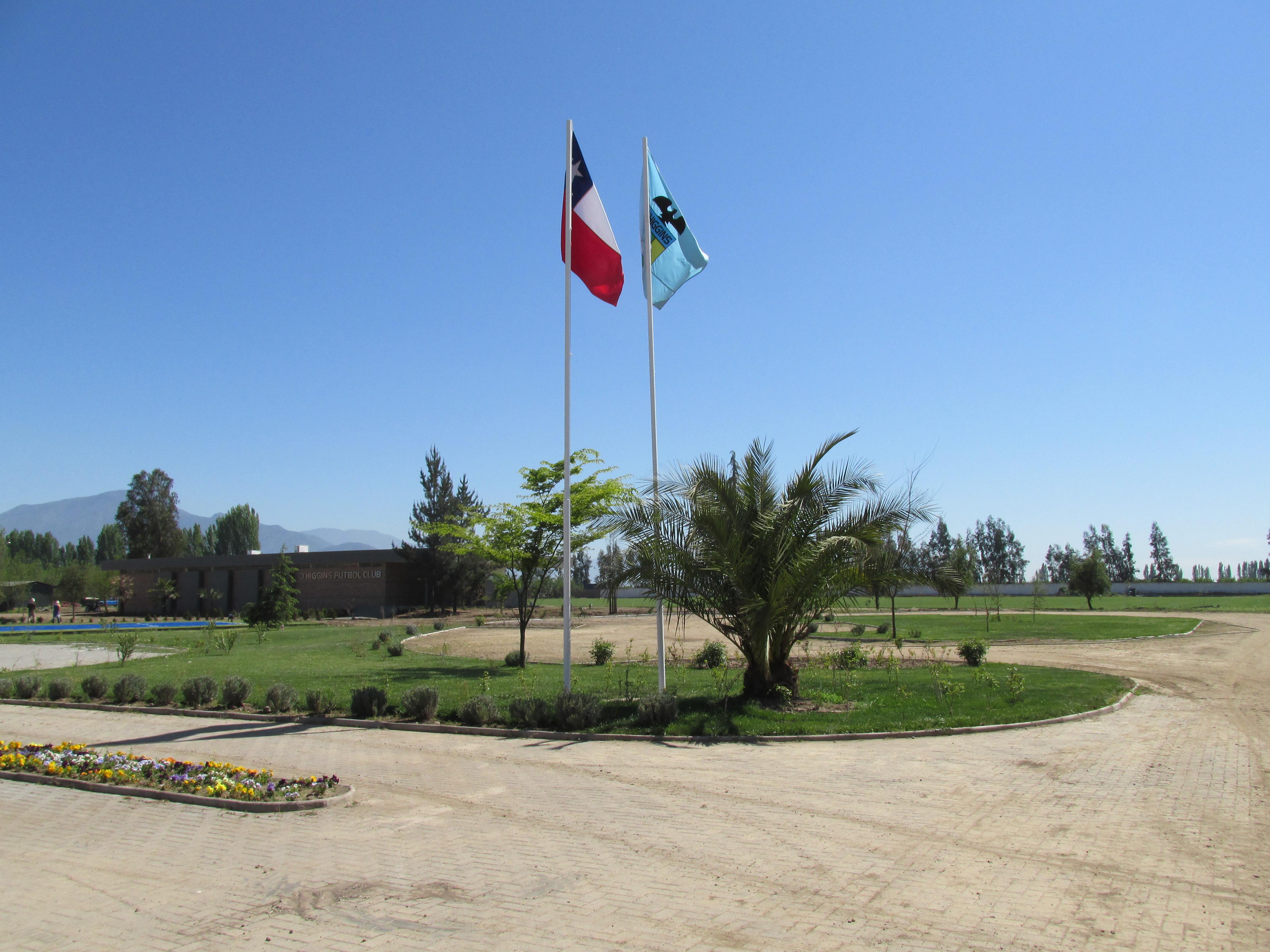 Complejo Deportivo Monasterio Celeste en Requinoa